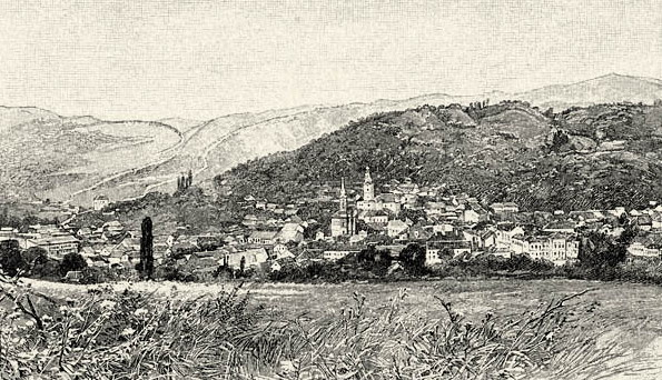 View of Zalău, published in Szilágyi vármegye monográfiája, Vol II, 1902, p. 455.